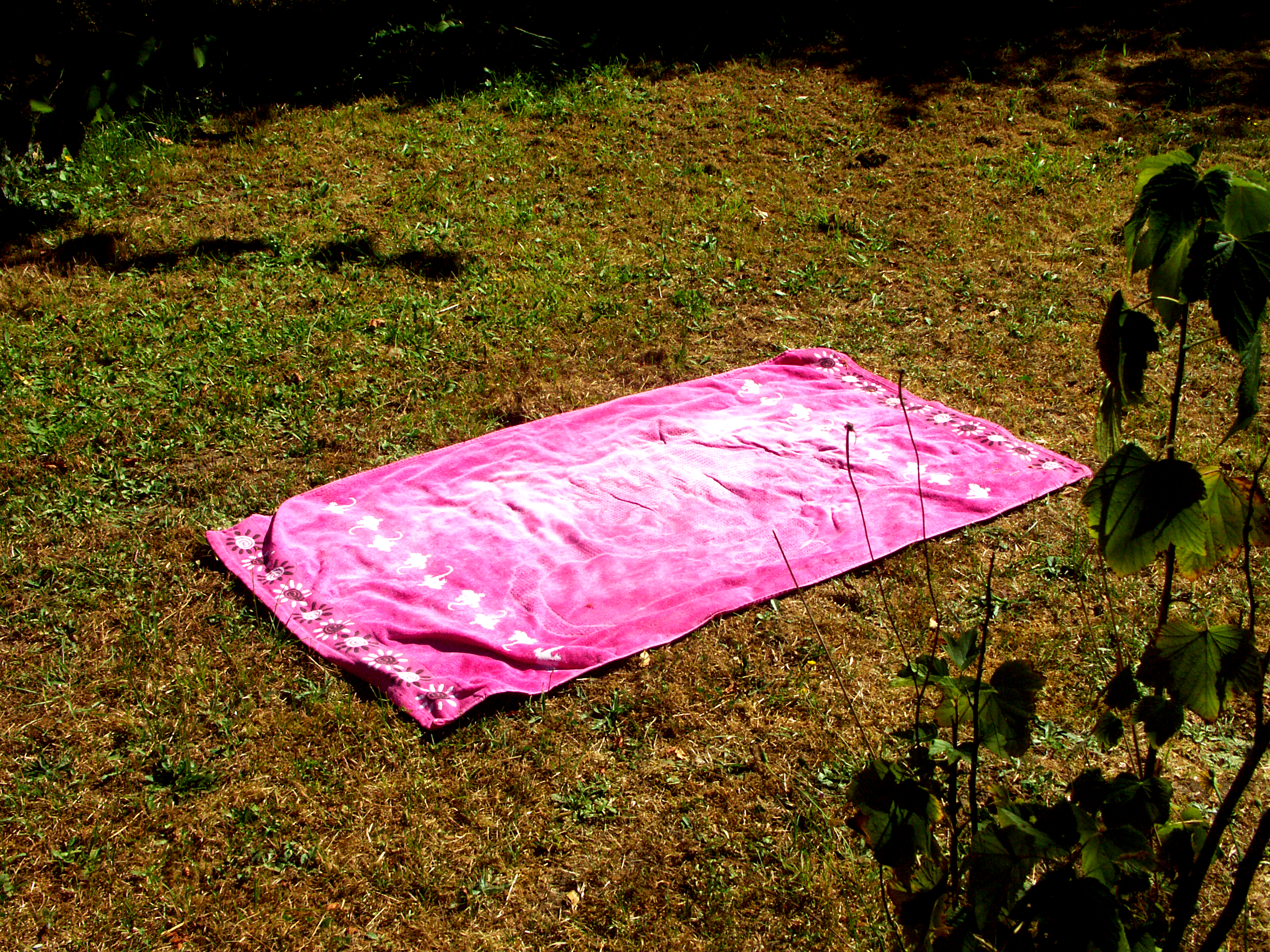 Serviette de plage sur l'herbe